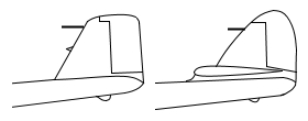 Roder skillnad mellan en Vampire mk.I och en Mk.V